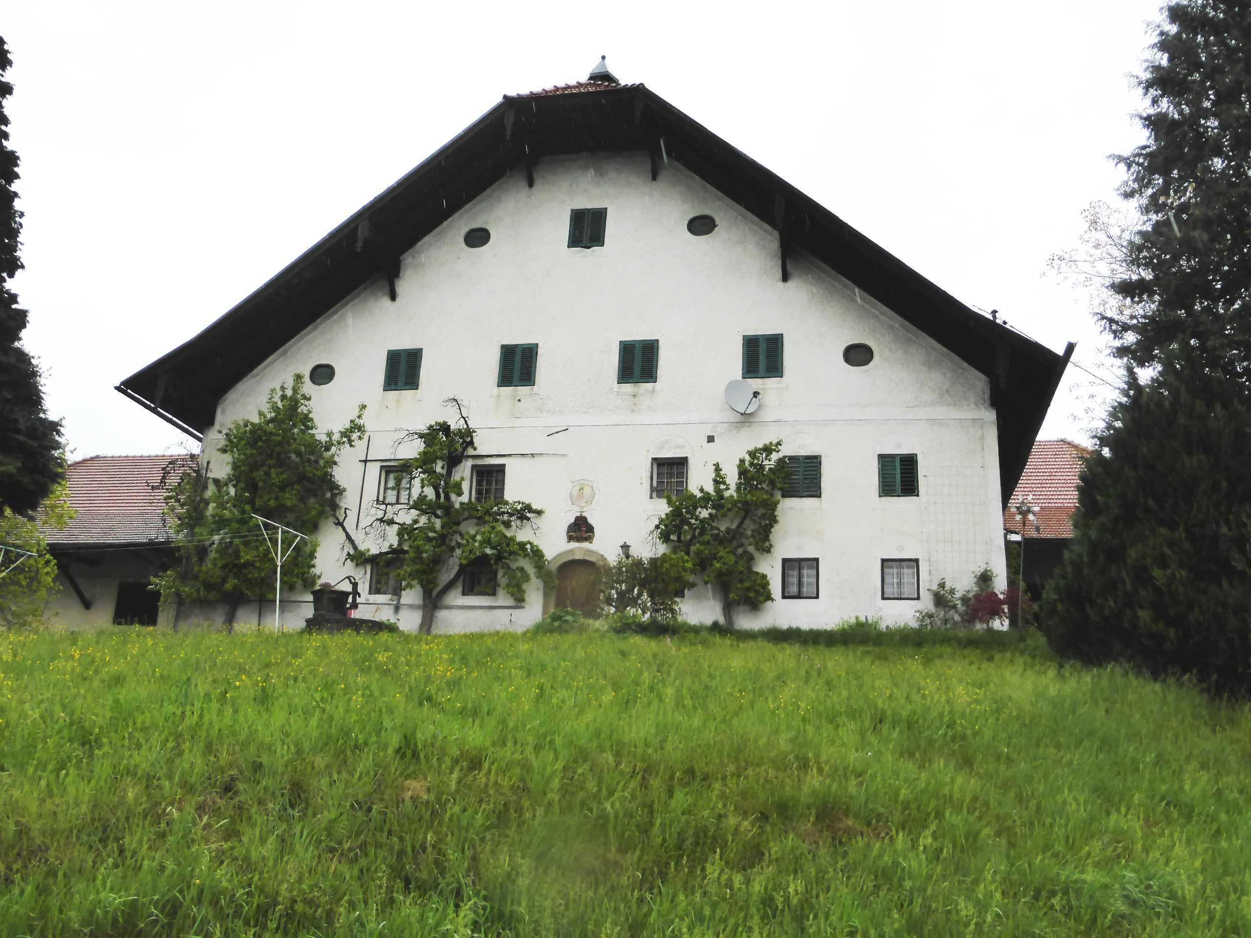 Bauernhaus, Gut Nußdorf bzw. Berndlgut